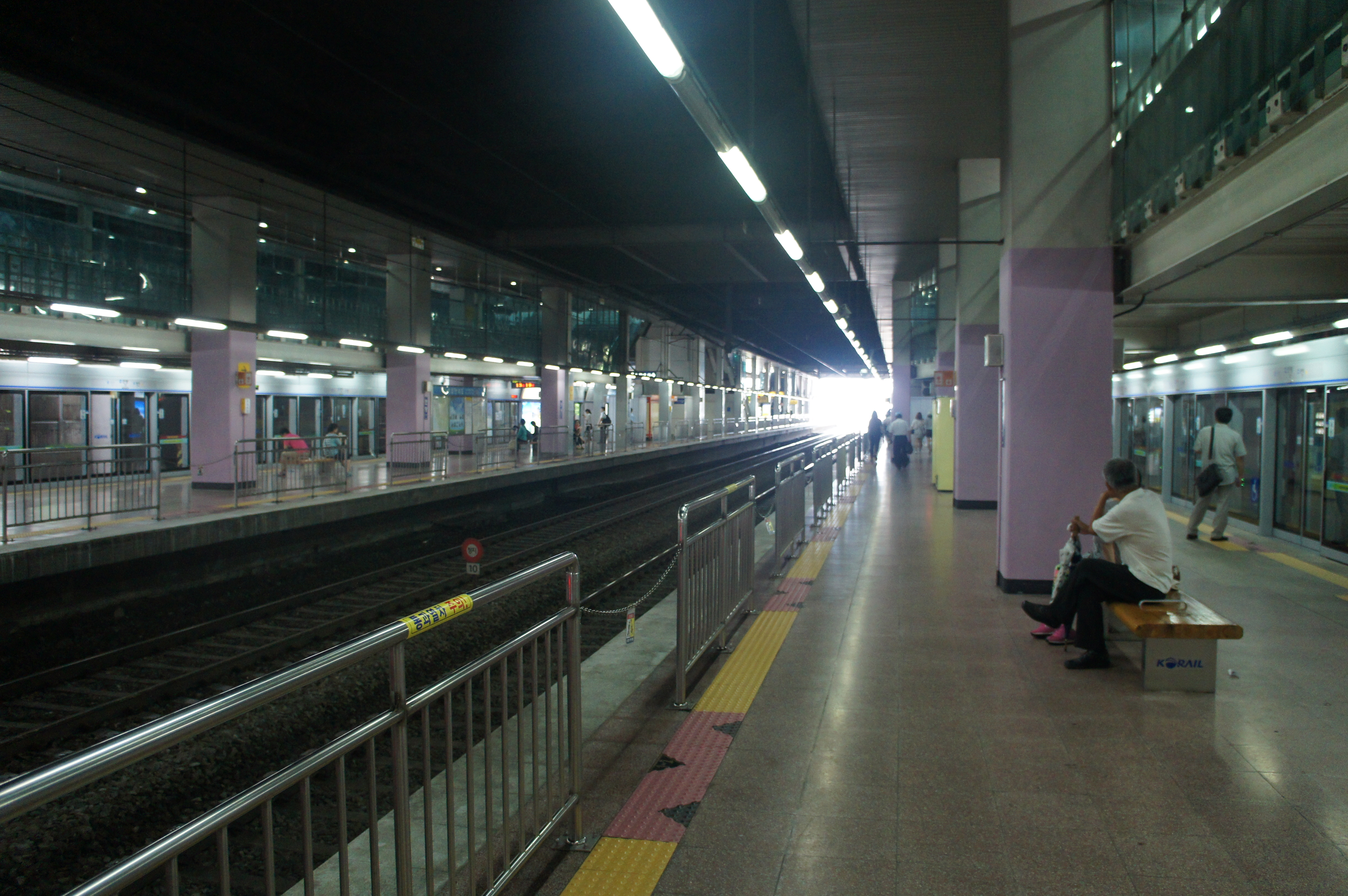 안양역 승강장